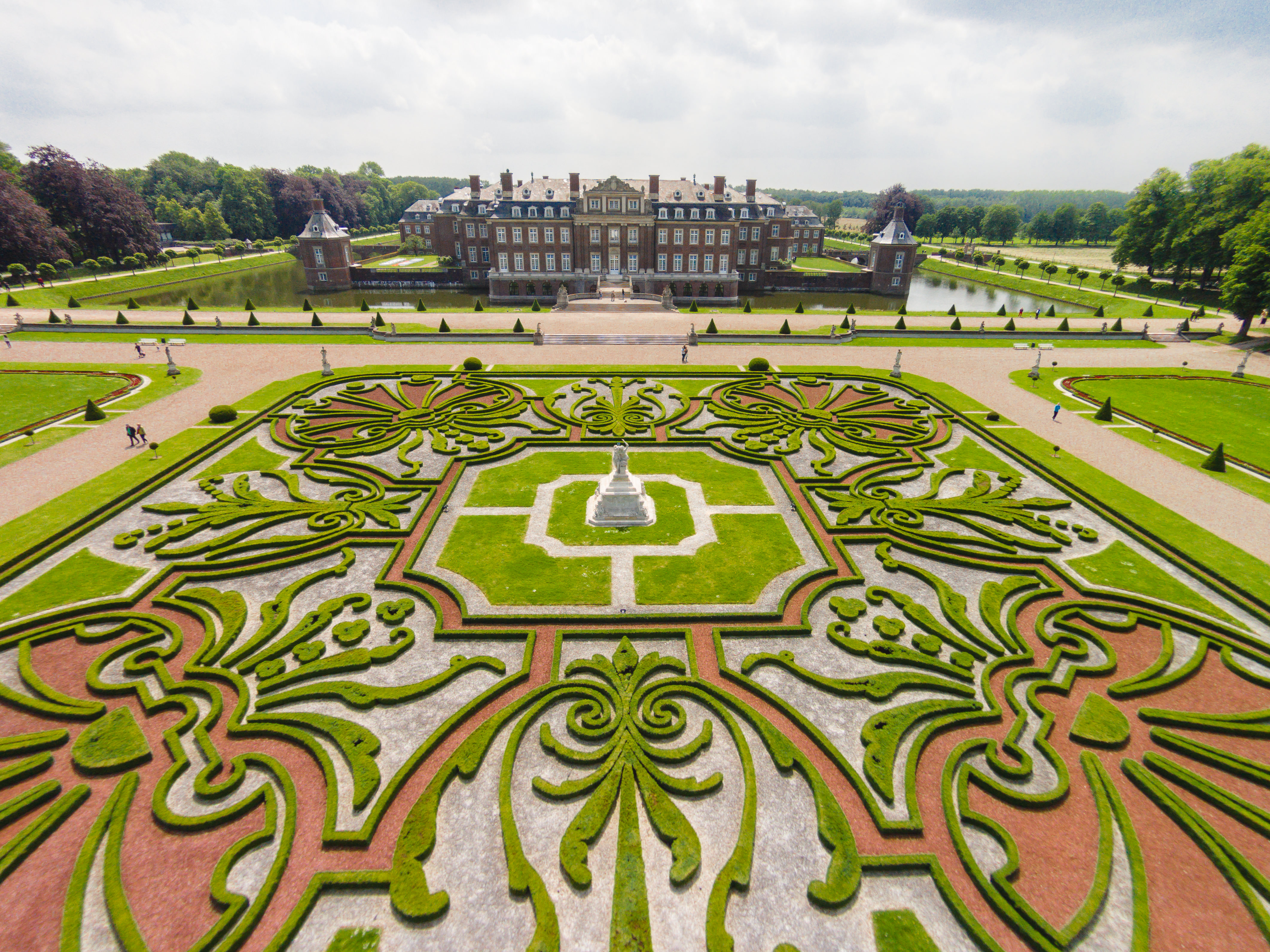 Schloss Nordkirchen und Anlage in NRW aus der Luftperspektive